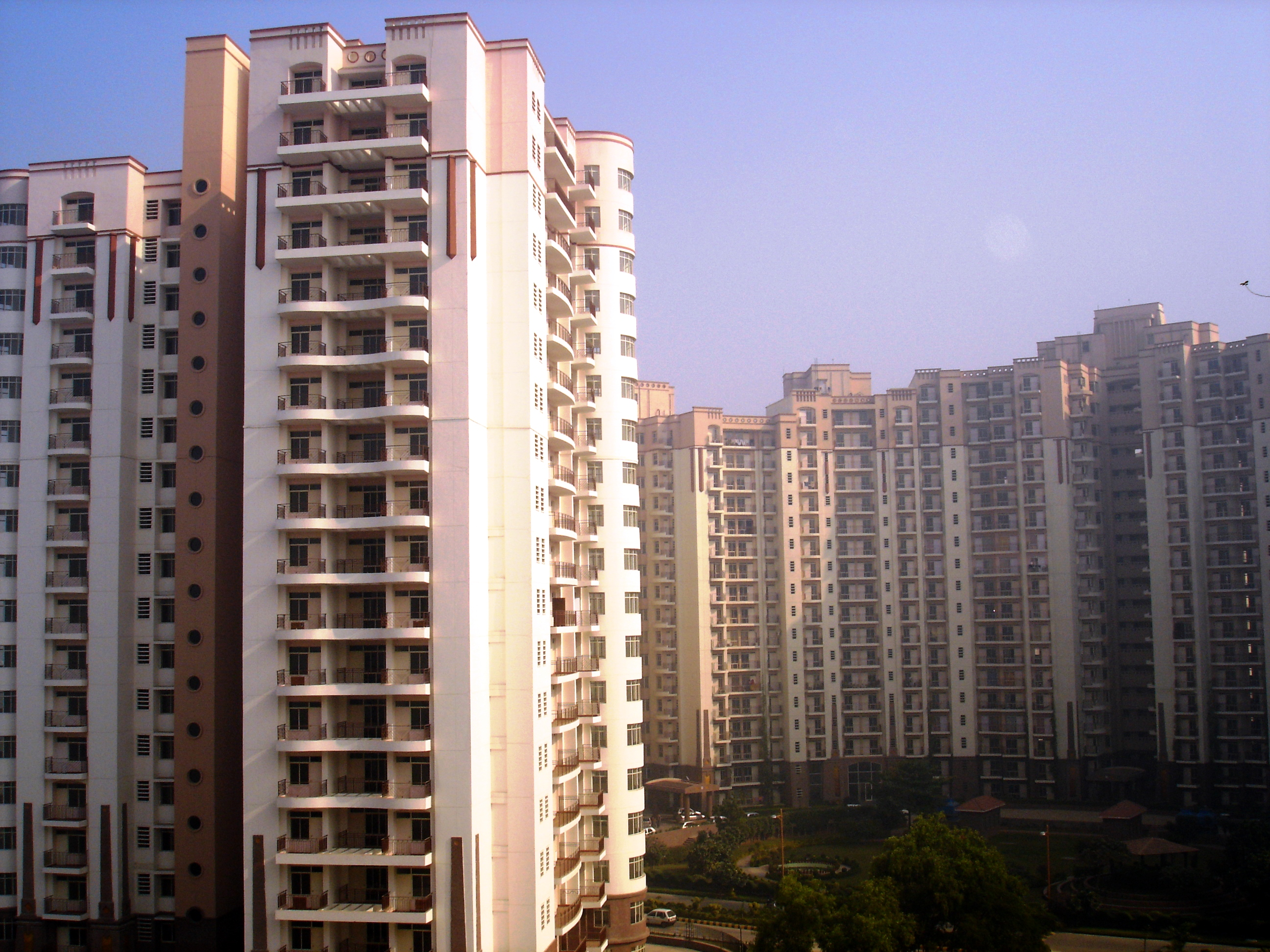 Essel Towers in Gurgaon, India